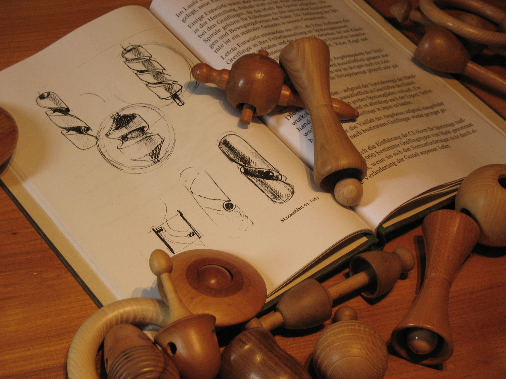 Das Spielzeug "Allbedeut" von Hugo Kuekelhaus